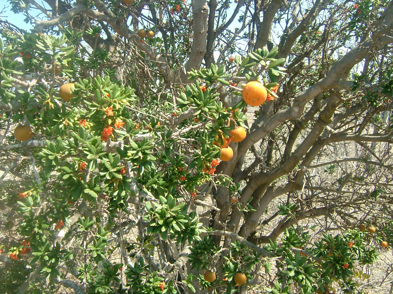 Barbasco